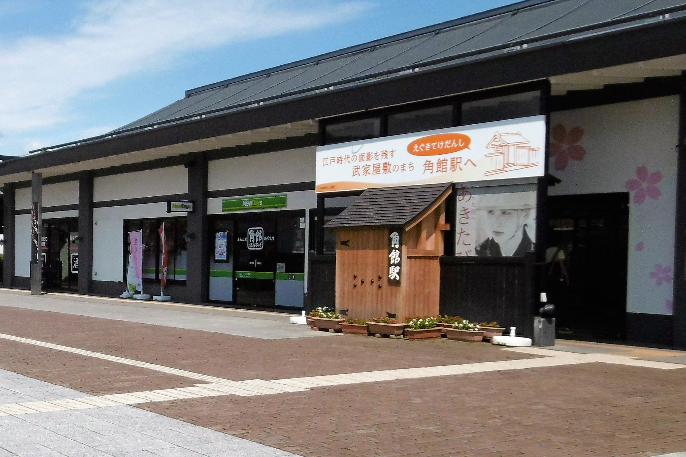 JR角館駅：仙北市角館町